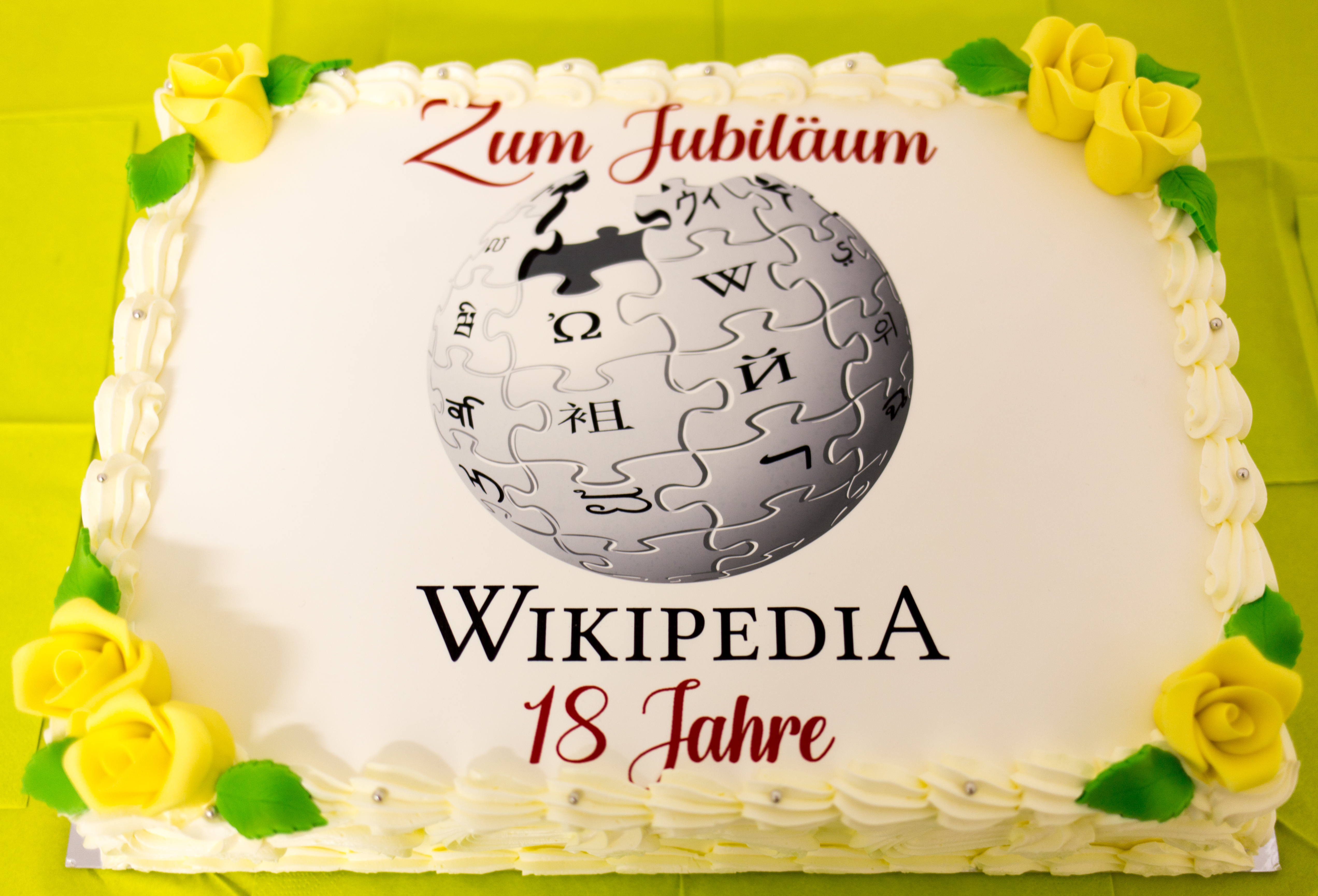 Geburtstagskuchen zum 18 Jährigem bestehen der Wikipedia. Gefeiert im Wikibär – feinste Butter. Hergestellt von Café Torten-Träume Residenzstr. 108 13409 Berlin